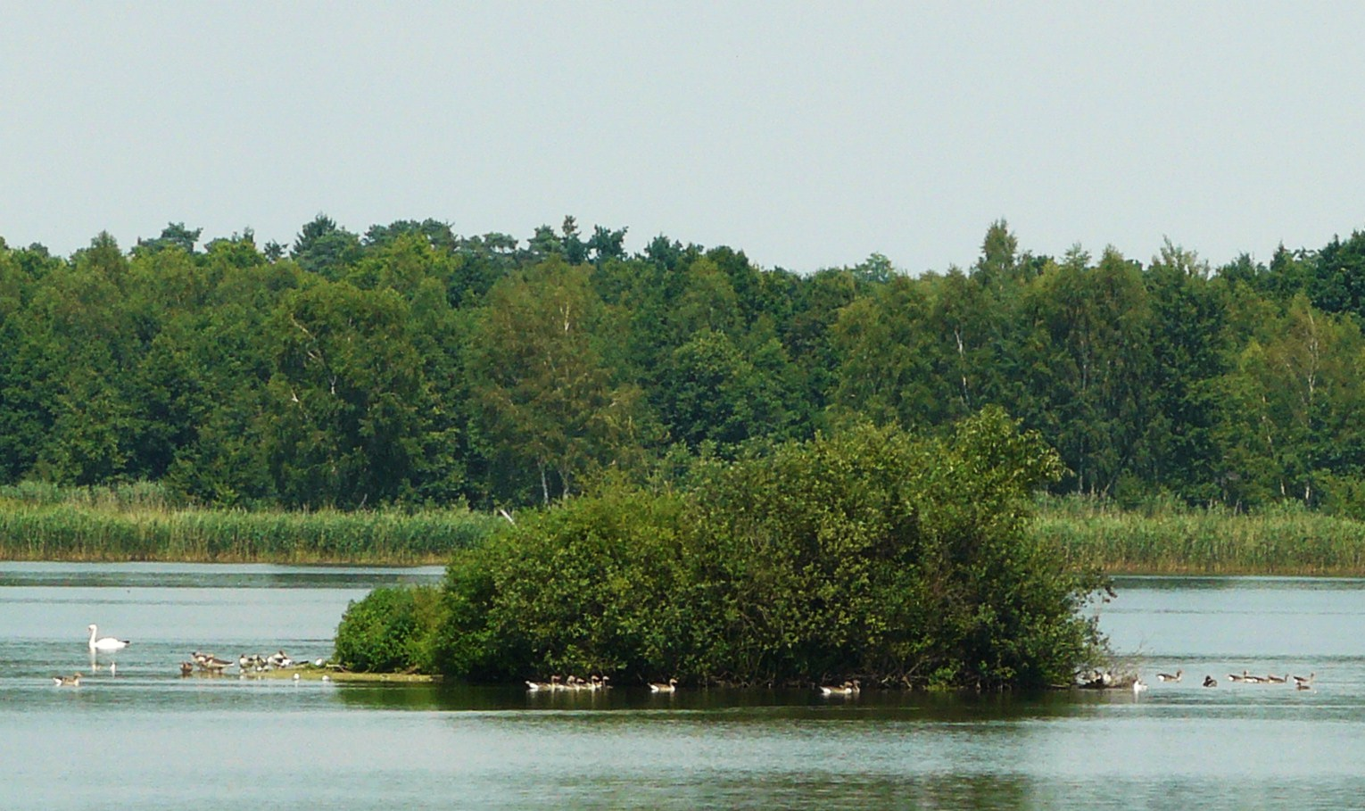 Stawy Milickie - staw Rudy w Rudzie Żmigrodzkiej.